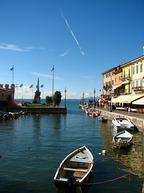 Hafen von Lazise, Lazise am Gardasee